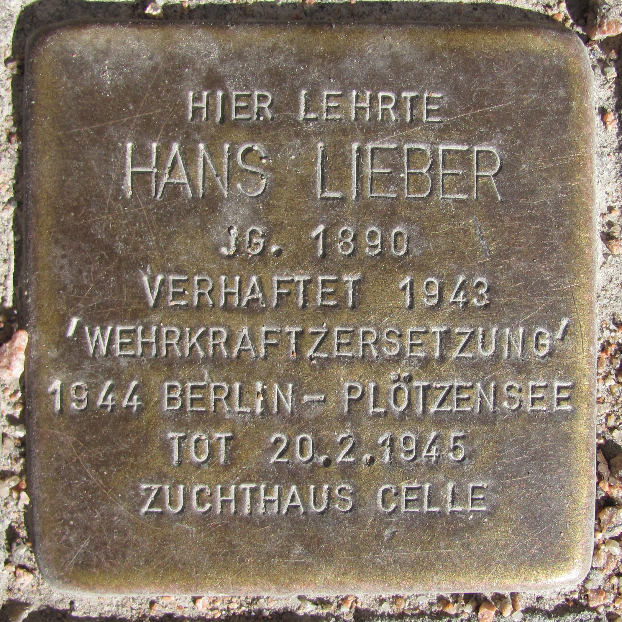 Stolperstein für Hans Lieber vor dem Haus Von-Essen-Straße 82